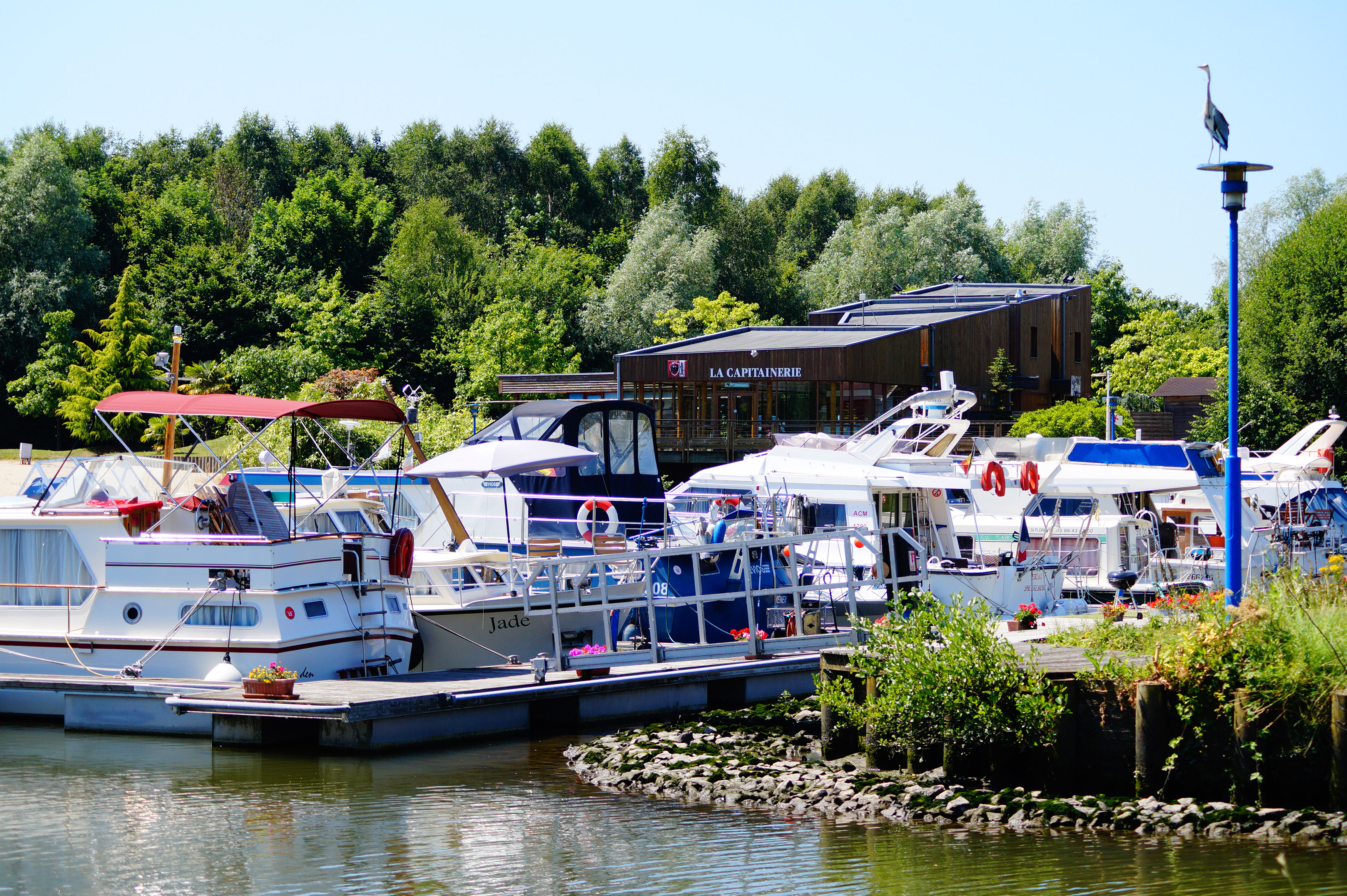 Le port de plaisance Halluin-Menin se situe proche de la Lys.L'espace de plusieurs hectares offre une multitude de possibilités aux nombreux visiteurs. La détente, le loisir et la découverte sont les 3 mots d’ordres de ce lieu, désormais mythique, du tourisme Halluinois.